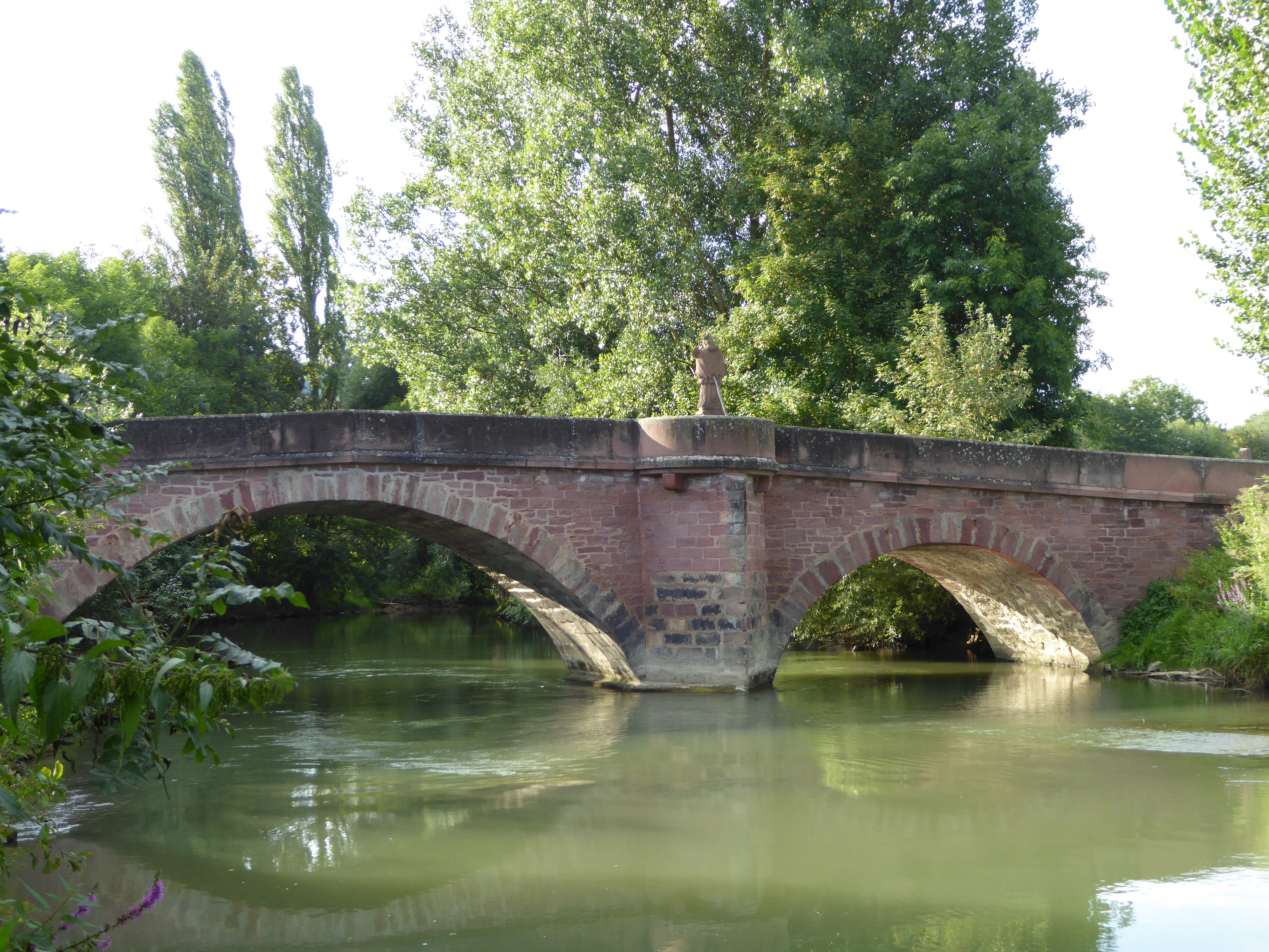 Tauberbrücke zwischen Hochhausen (Tauberbischofsheim) und Werbach. Erbaut Anfang 18. Jhd.